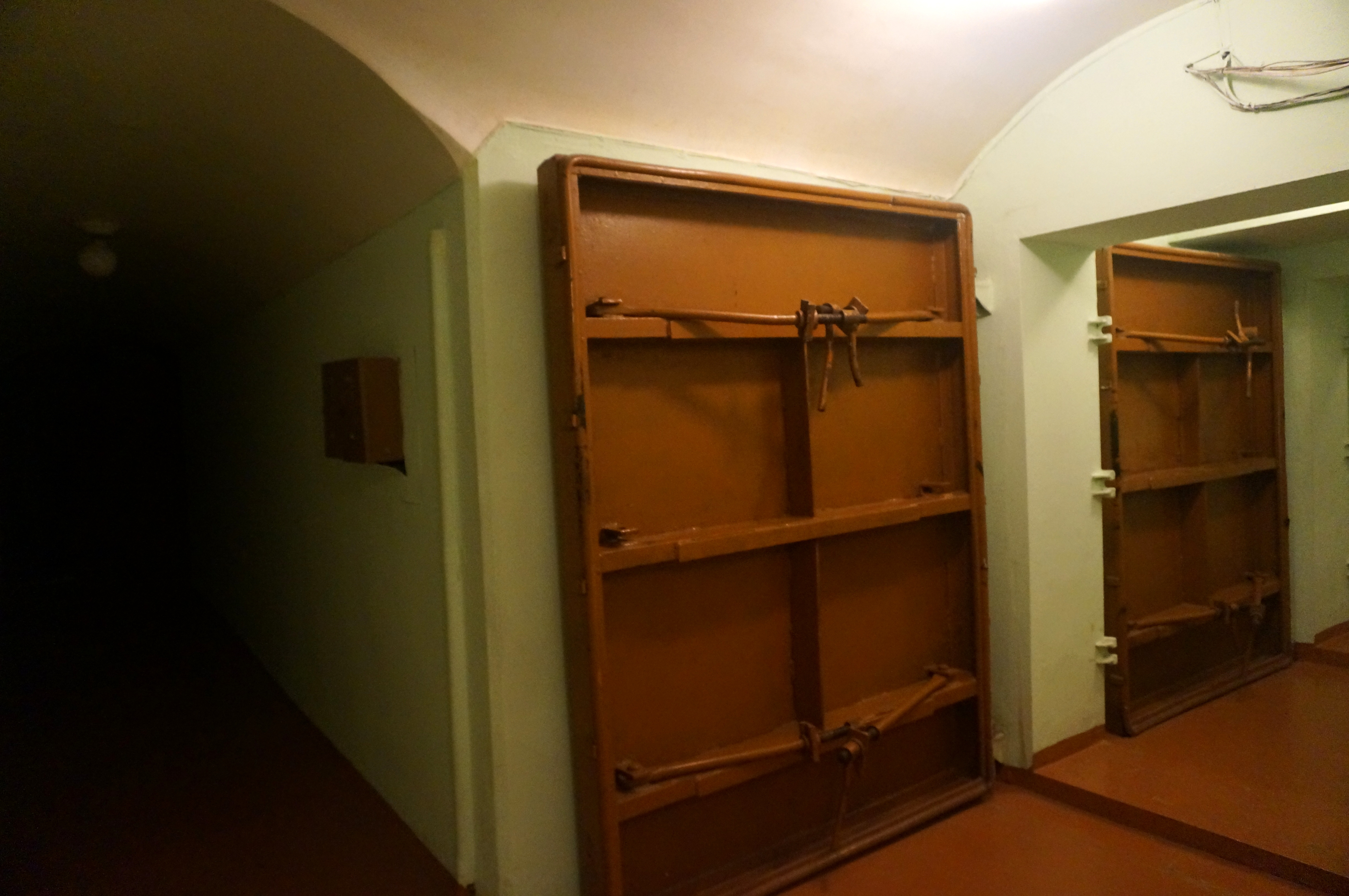 Гермодвери, обеспечивавшие защиту в том числе от газов. Бункер Сталина. Самара